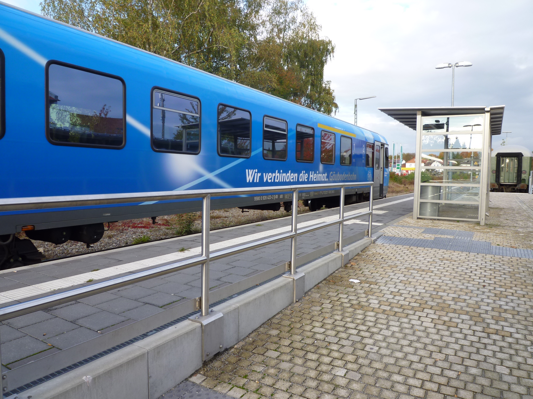 Die blaue Gäubodenbahn mit dem Namen "Stadt Bogen" im Bahnhof Bogen.